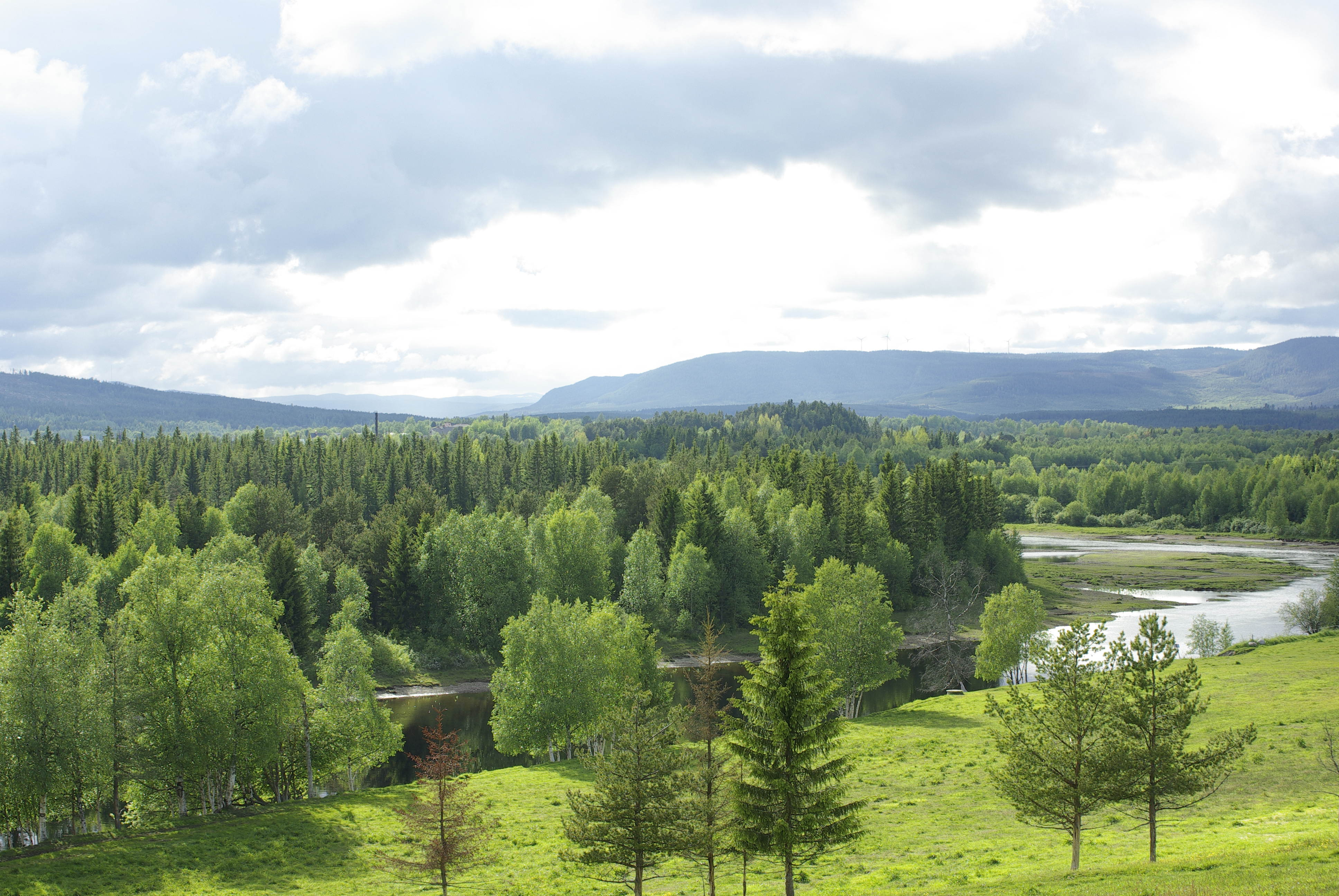 Vy över Hede från Östbacken